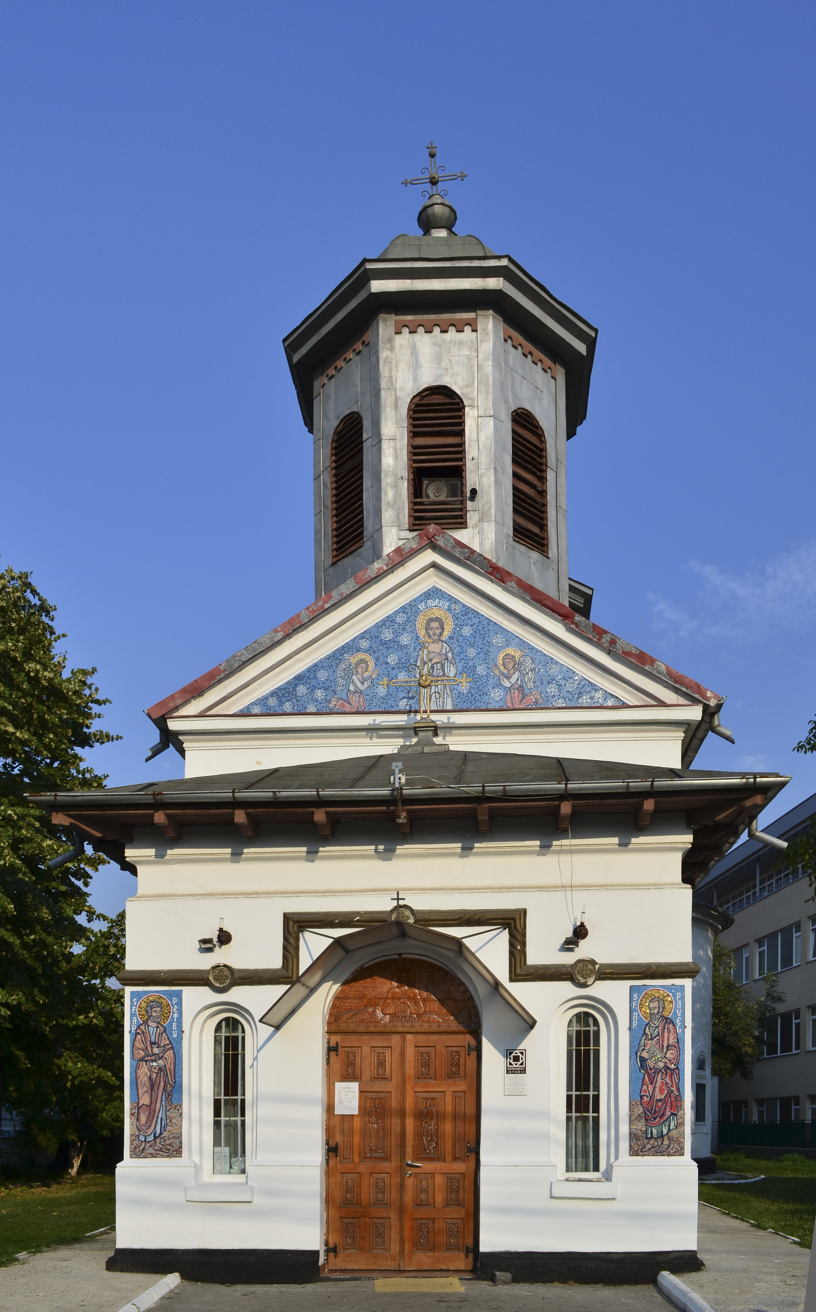 Biserica Alexe din București, cu hramul "Adormirea Maicii Domnului"